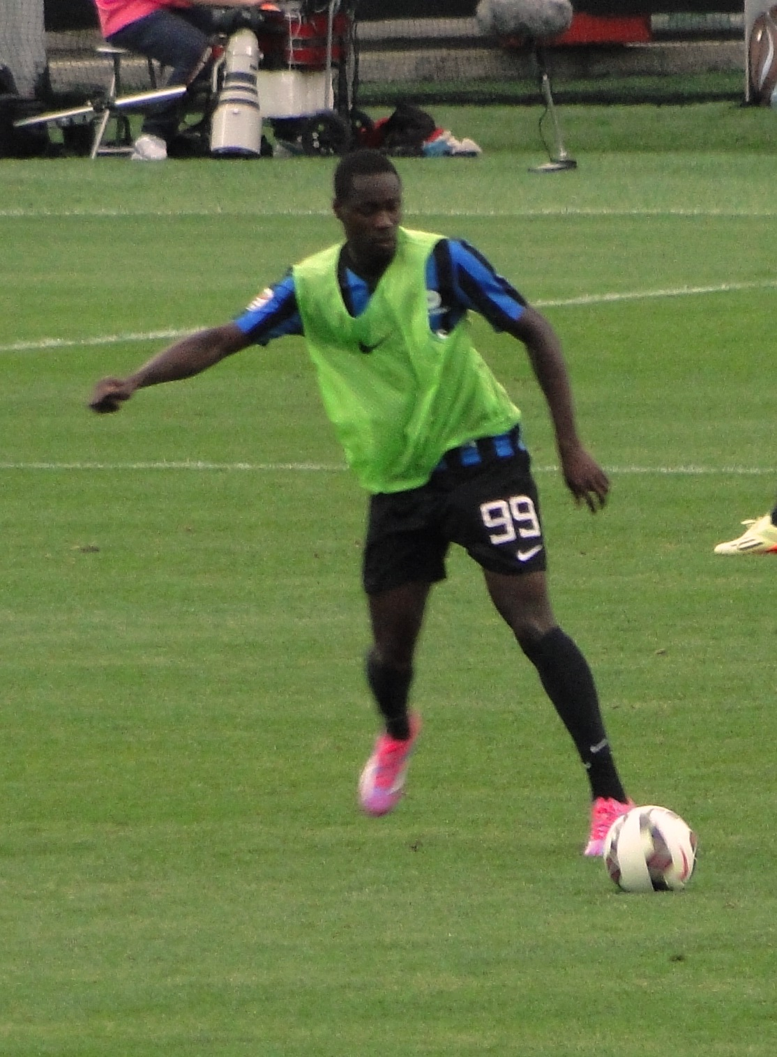 Richmond Boakye, calciatore ghanese, con la maglia dell'Atalanta